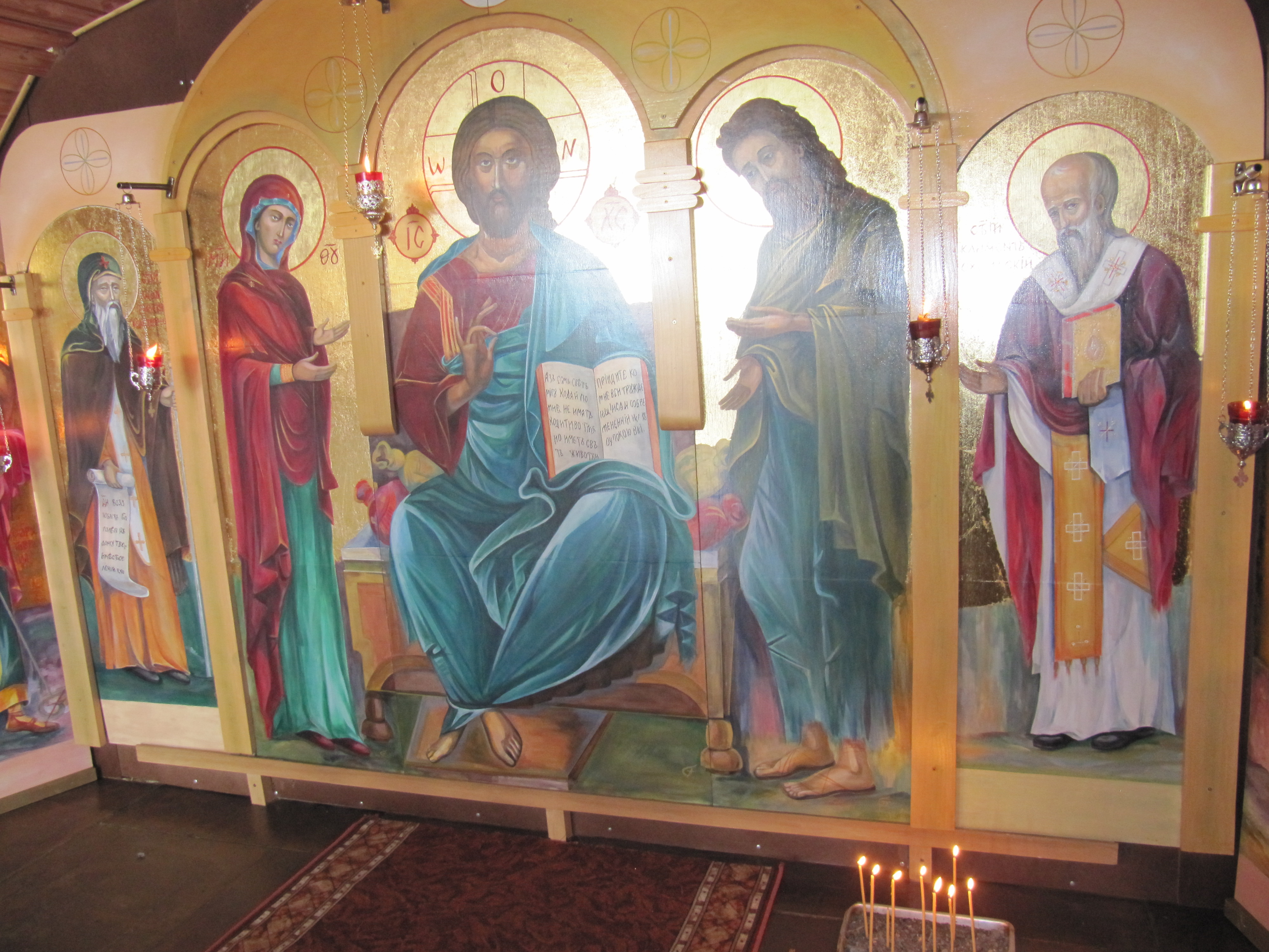 The altar of the new St. Ivan Rilski Chapel at the Bulgarian base on Livingston Island in Antarctica